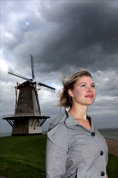 Franca Treur (Meliskerke, 23 juni 1979) is een Nederlandse schrijfster en freelance journaliste voor NRC Handelsblad en nrc.next.